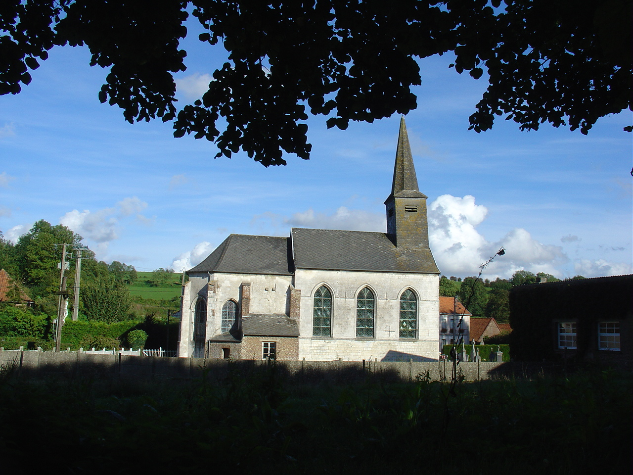 Église de Fontaine-lès-Boulans